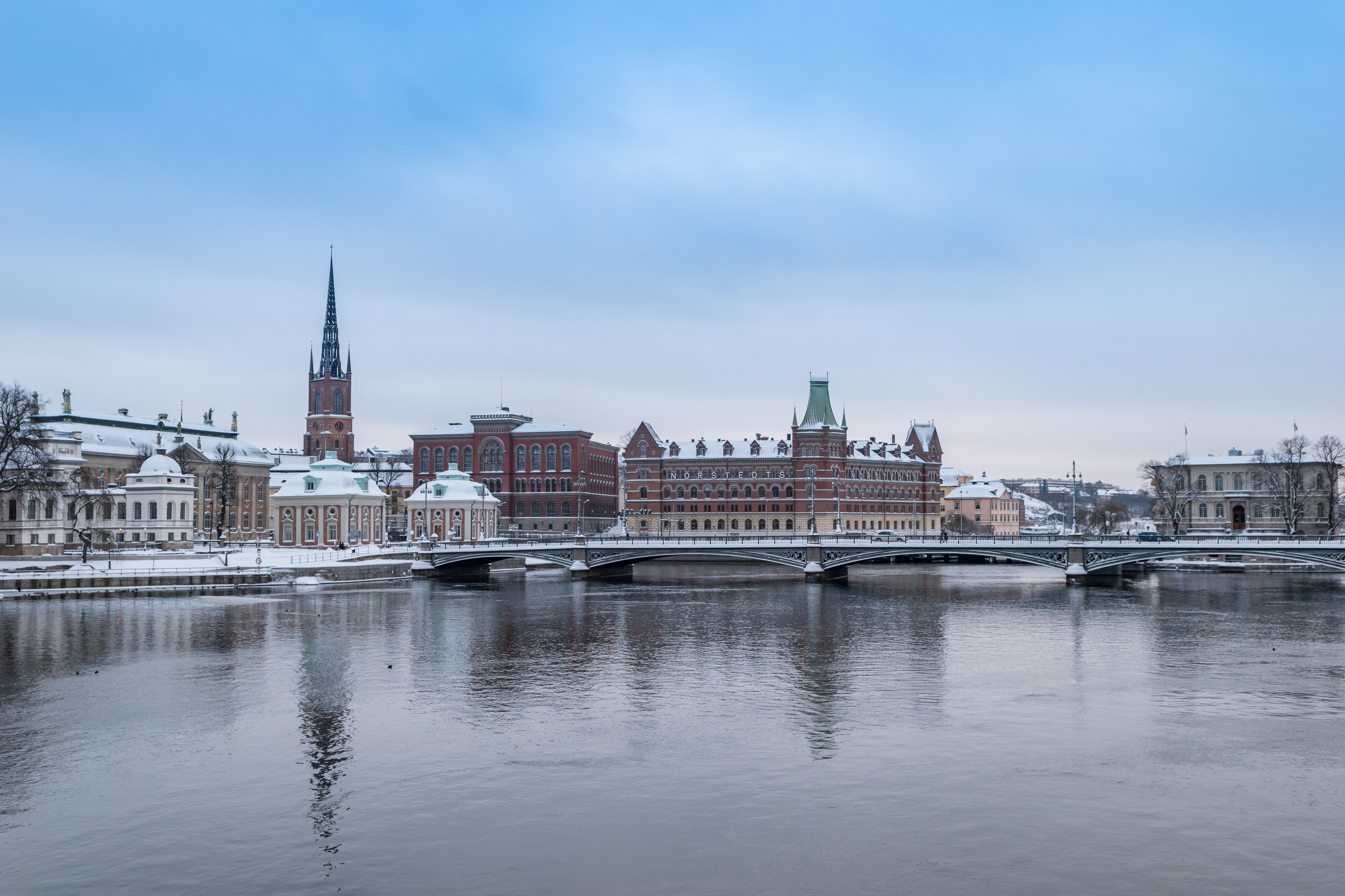 Stockholm Altstadt Insel